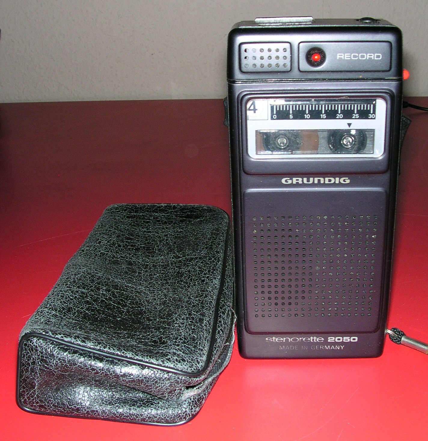 Grundig Diktiergerät „Stenorette 2050“